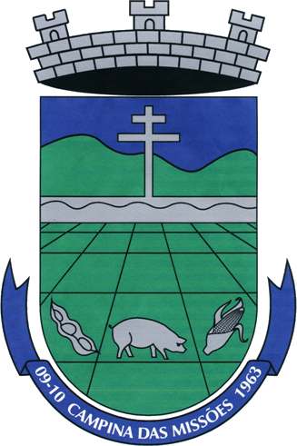 Brasão da cidade de Campina das Missões, localizada no noroeste do estado do Rio Grande do Sul, região sul do Brasil.